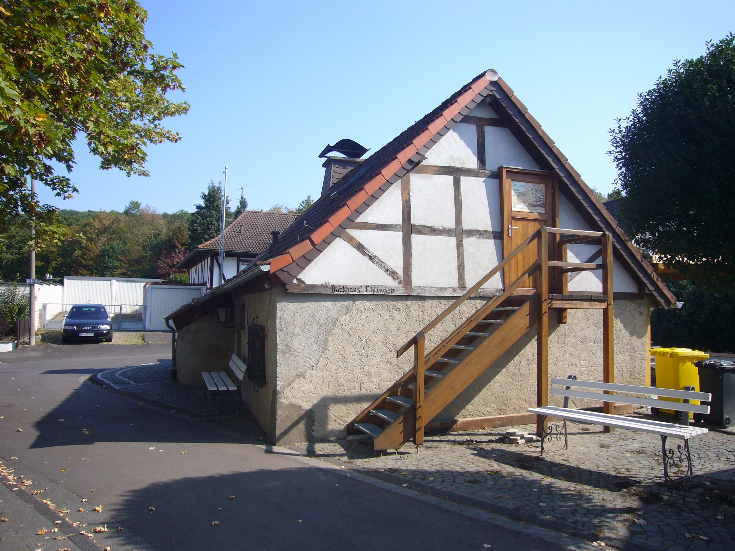 Das Backhaus, genannt Backes, in Ehlingen. Es geht zurück bis in die Mitte des 17. Jahrhunderts.